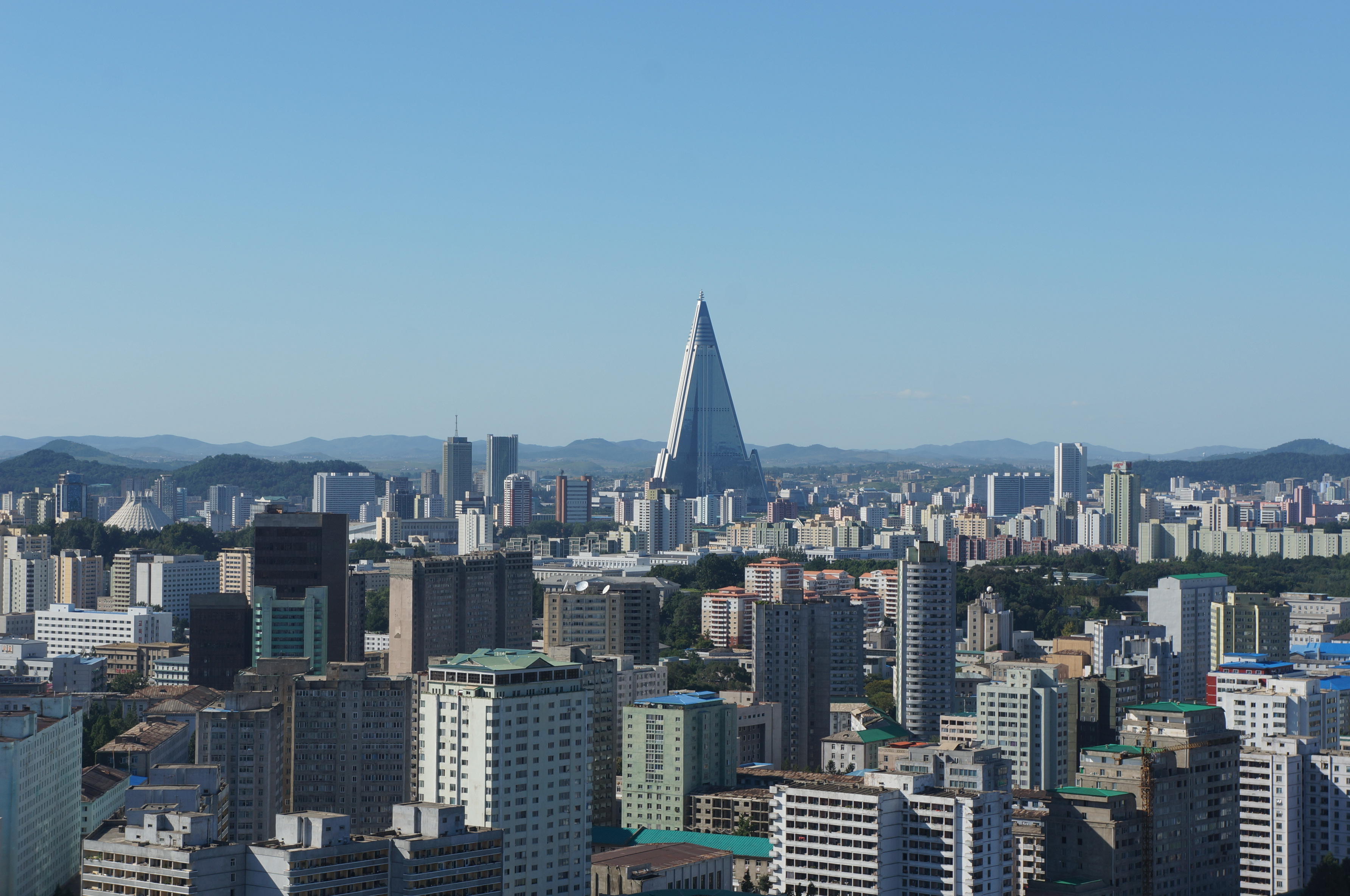 Pyongyang City - Ryugyong Hotel in Background